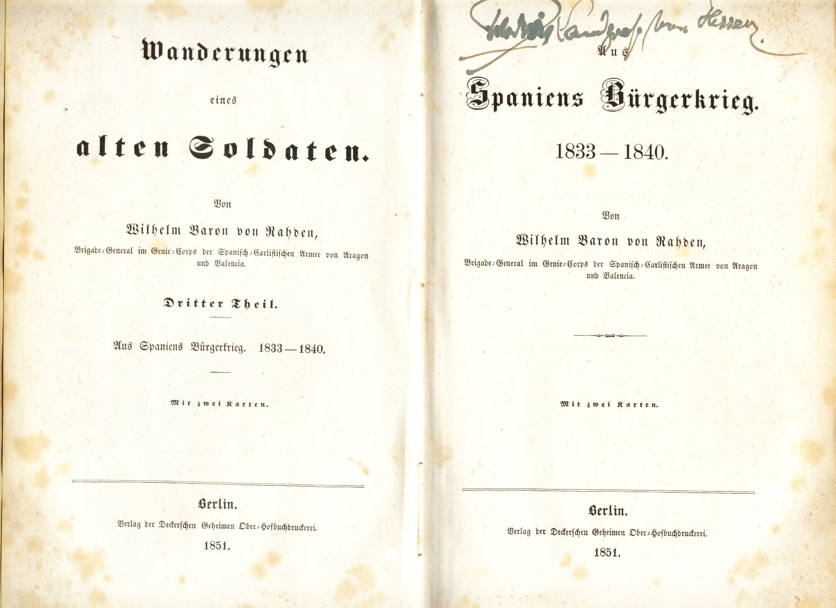 Portada y contraportada. Wilhelm Baron von Rahden. "Wanderungen eines alten Soldaten. Dritter Teil" y "Aus Spaniens Bürgerkrieg". 1833 1840. Berlin 1851